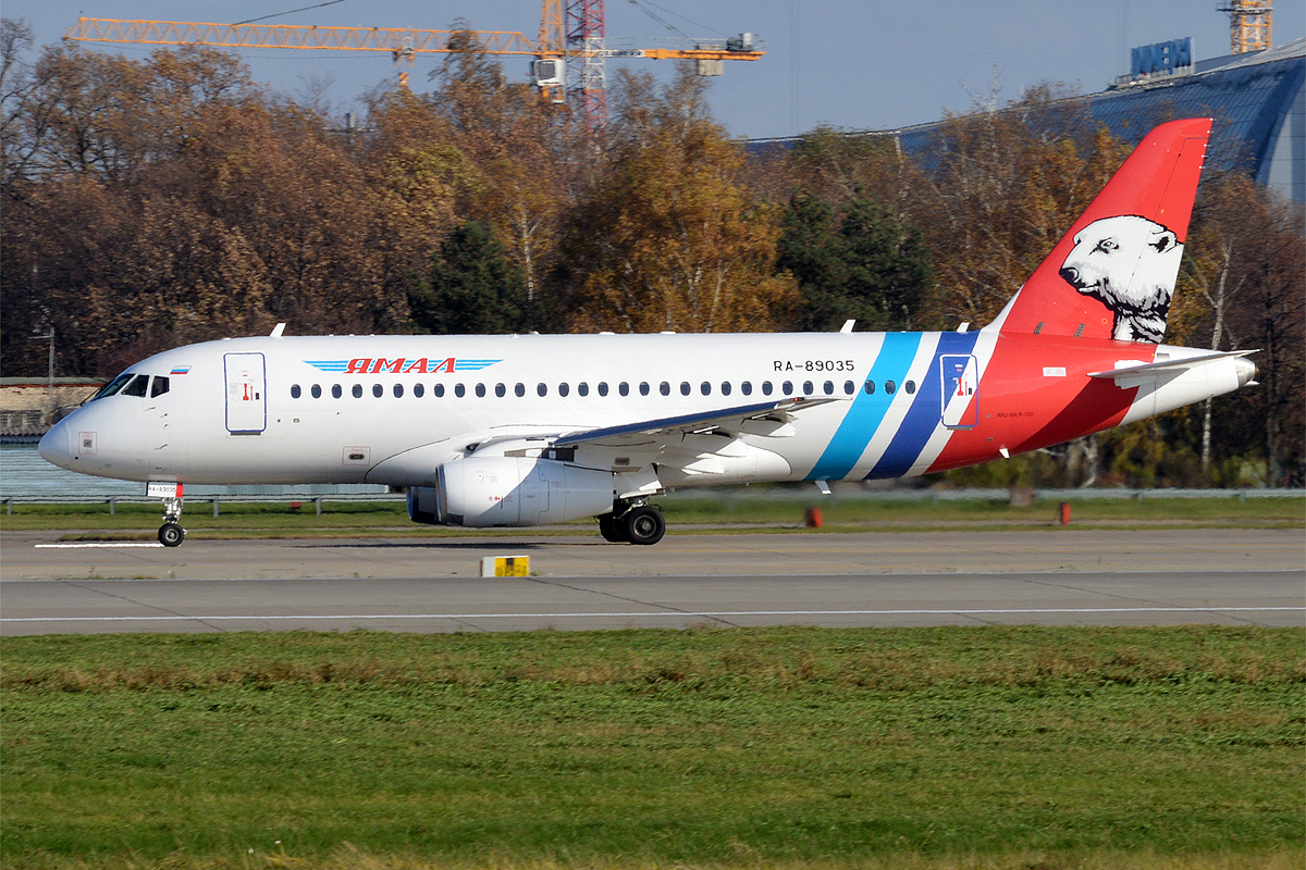 Yamal Airlines, RA-89035, Sukhoi Superjet 100-95LR